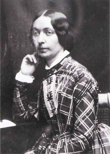 Taidemaalari Edla Jansson-Blommér